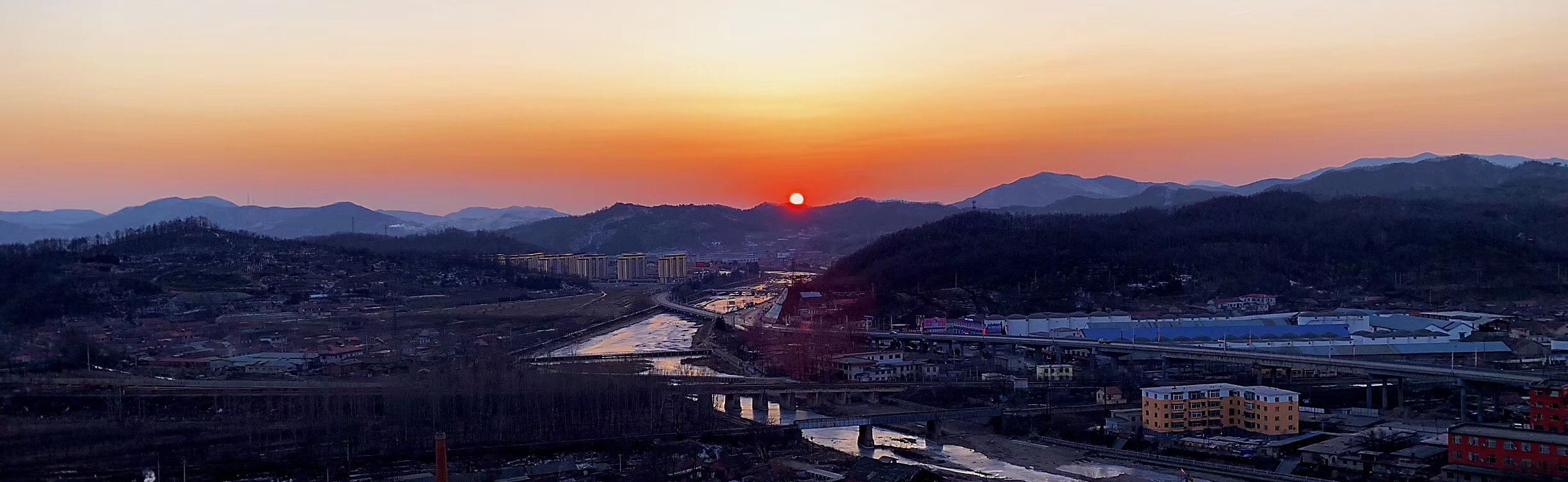 中文（中国大陆）: 凤山街道向西方向全景（二龙山、二道河）